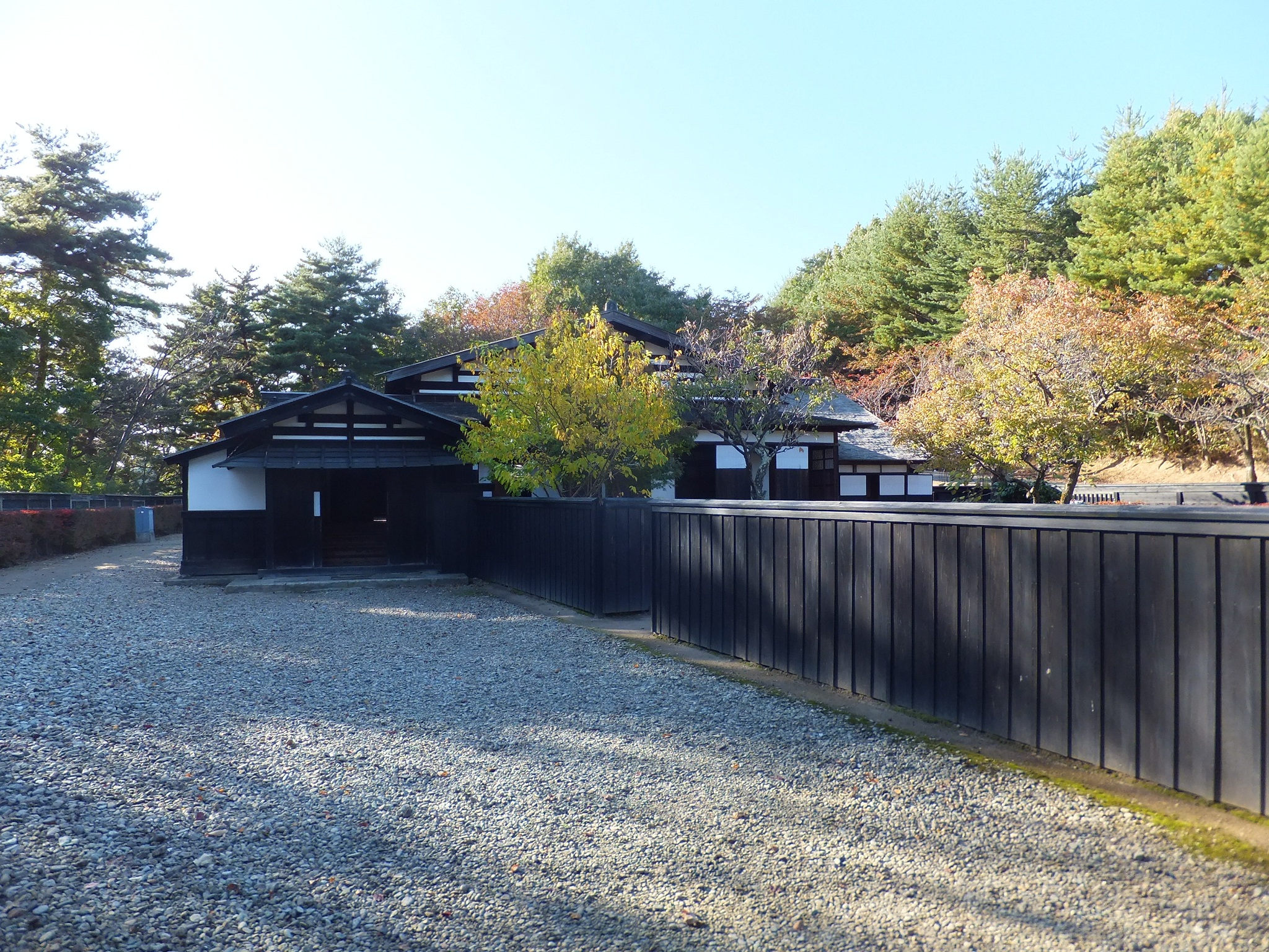 一つ森公園 旧黒沢家住宅